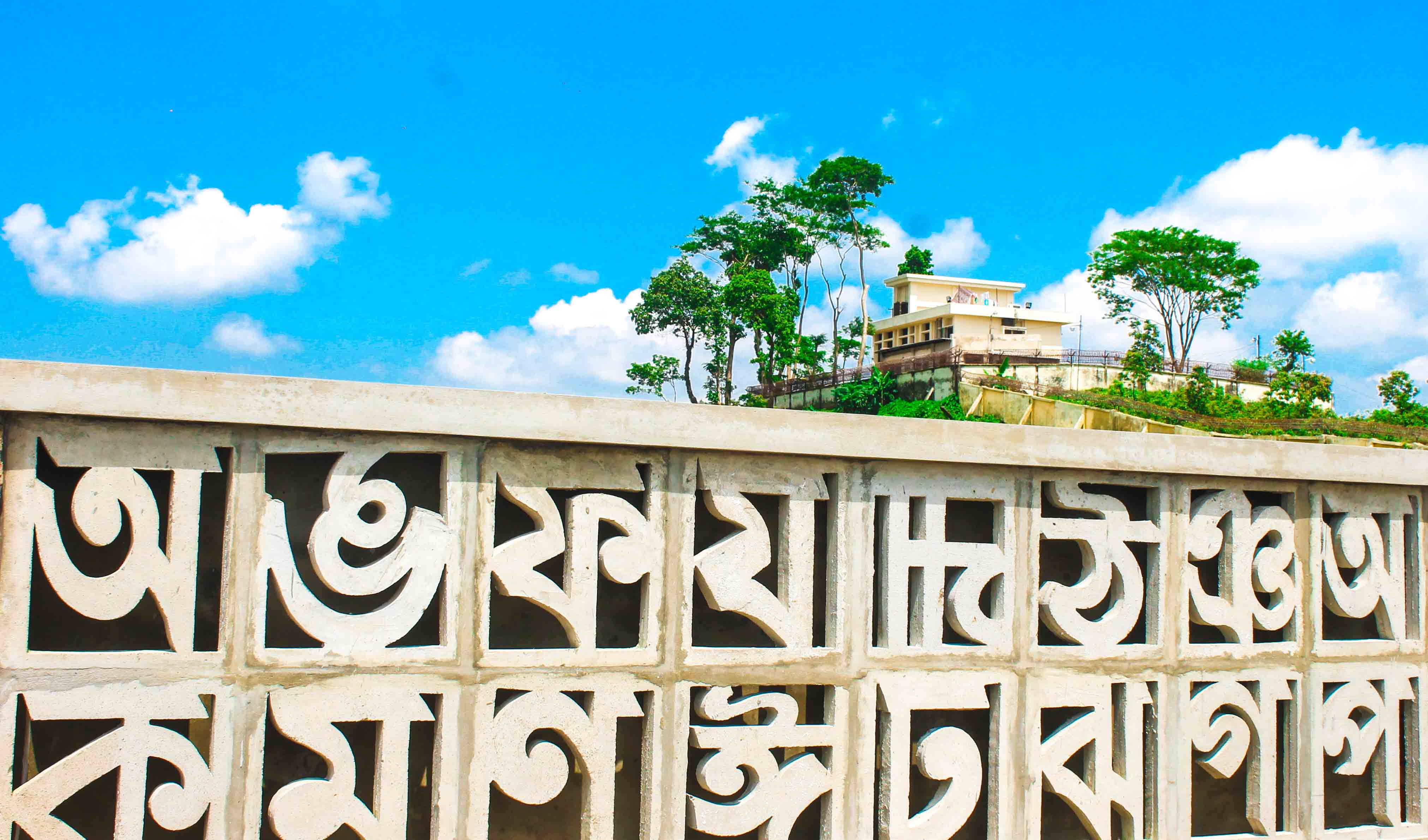 সিলেট কৃষি বিশ্ববিদ্যালয়ের কেন্দ্রীয় শহীদ মিনারের পাশে বর্ণমালার দেয়াল।